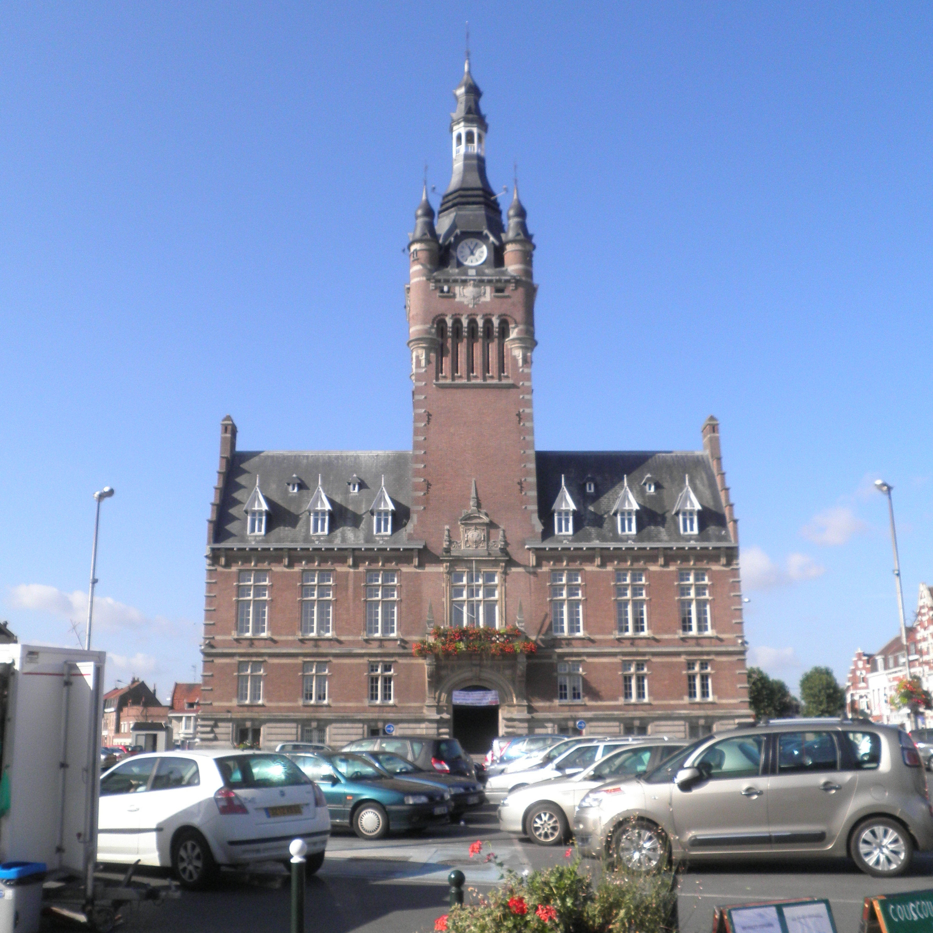 Hôtel de Ville de Merville, inauguré en 1929.